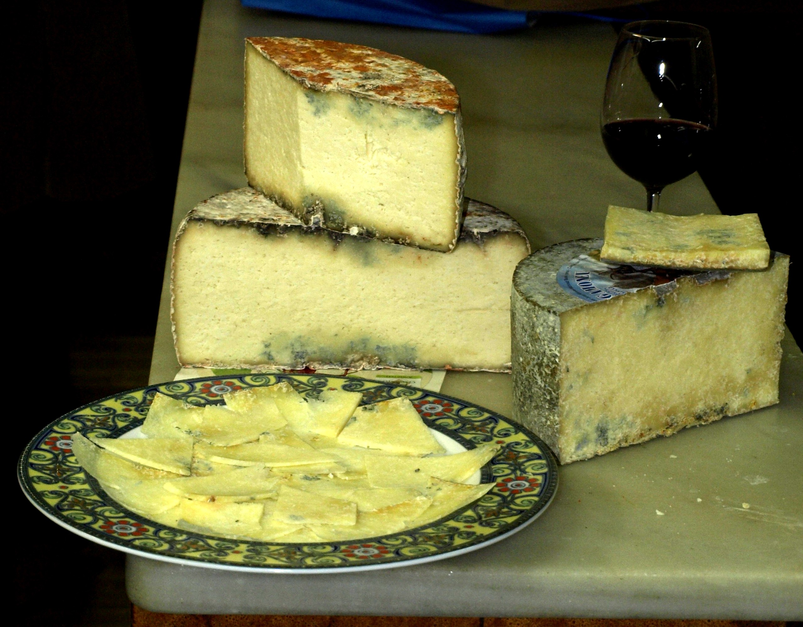 queso gamonedo